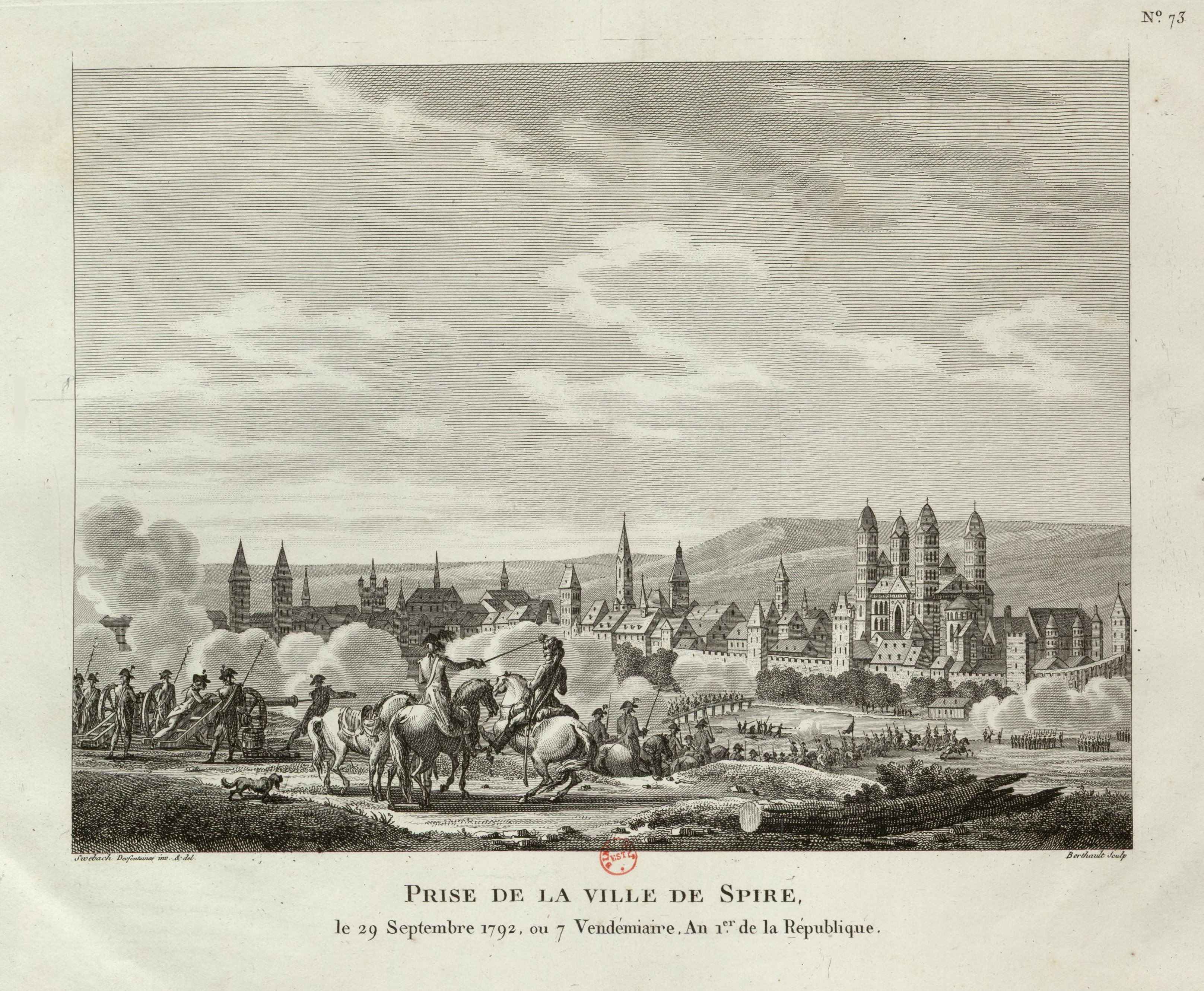 Tableau nº 73, extrait de la Collection complète des tableaux historiques de la Révolution française.